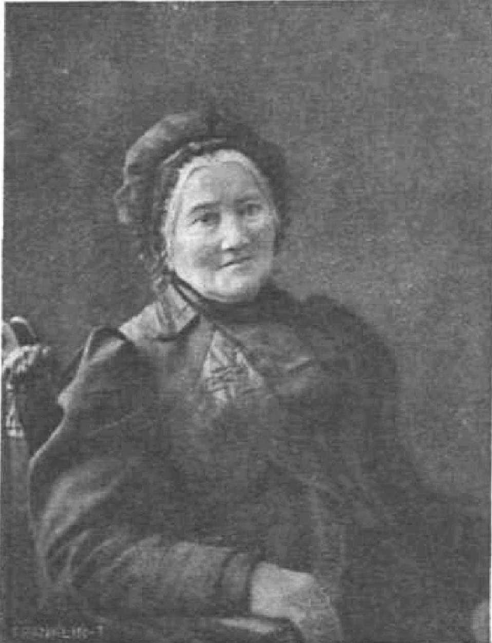 Damjanich Jánosné Csernovics Emília